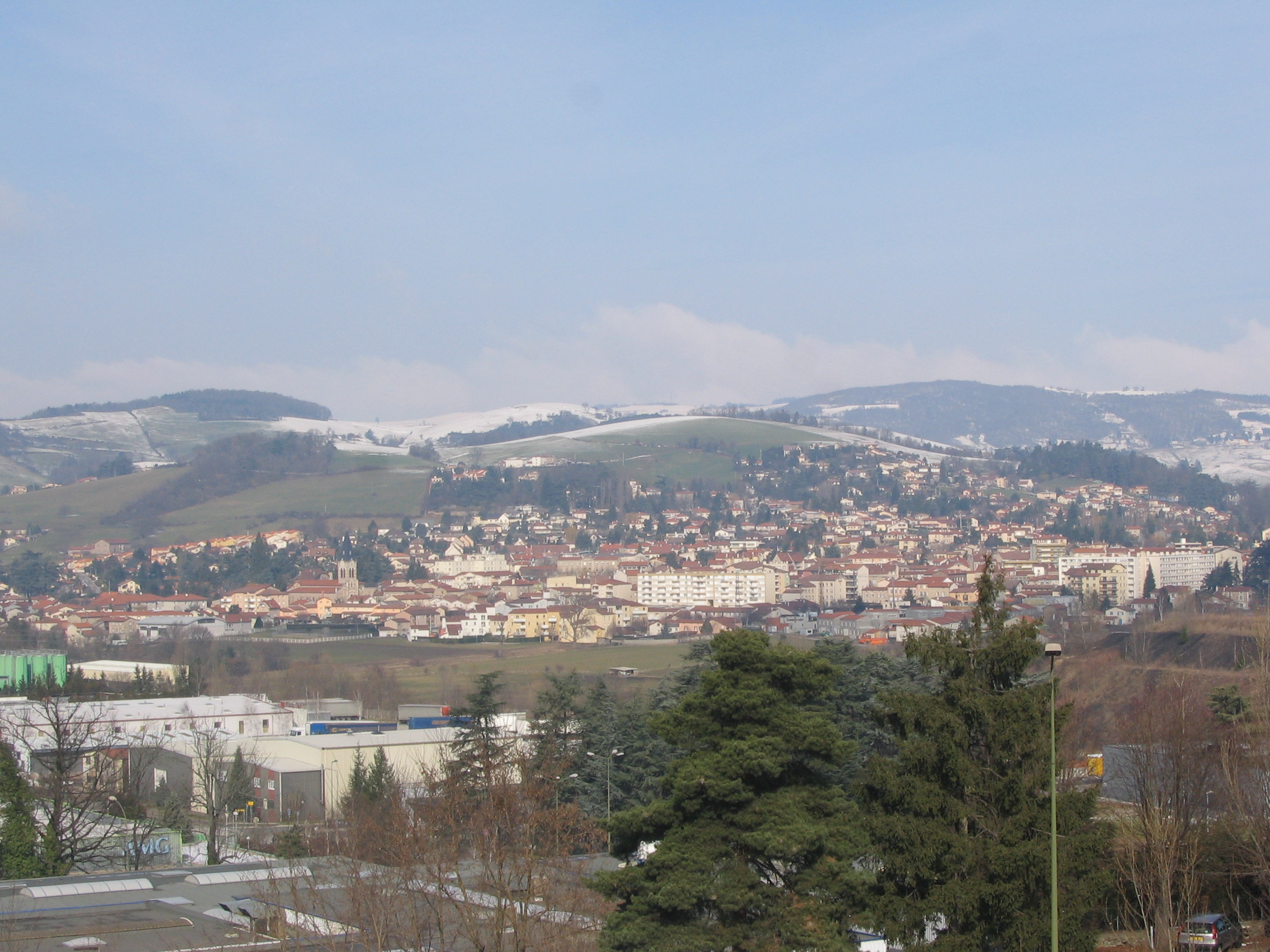 ZI Molina-La Chazotte au 1er plan, La Talaudière (Loire) ensuite.